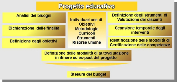 Progetto educativo:schema di massima